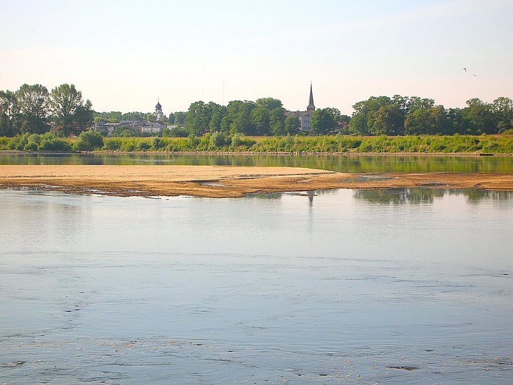 Wisła w Solcu Kujawskim